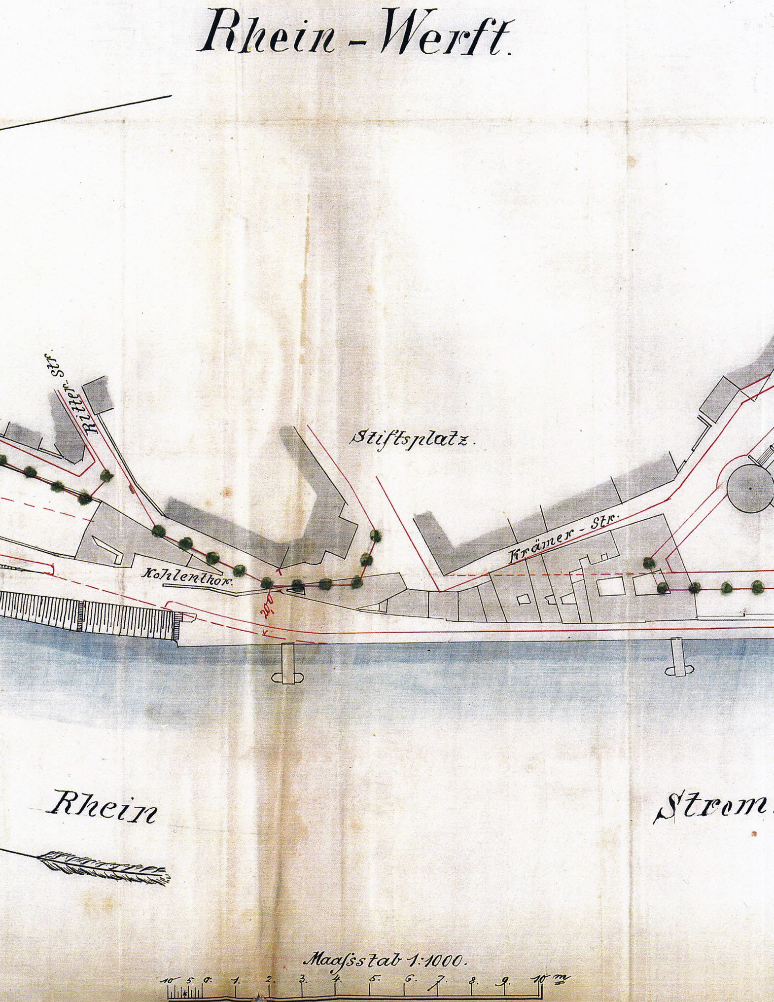 Teilscan eines Planes "Rheinwerft mit neuer Rampe zur Schiffsbrücke", vom 18. November 1886, Stadtarchiv Düsseldorf, III 10911.